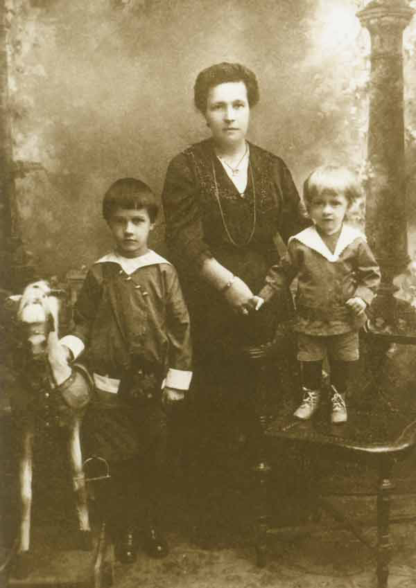 Сережа Извеков (слева) с матерью Пелагеей Афанасьевной и племянником Юрой 1917-1918 годы